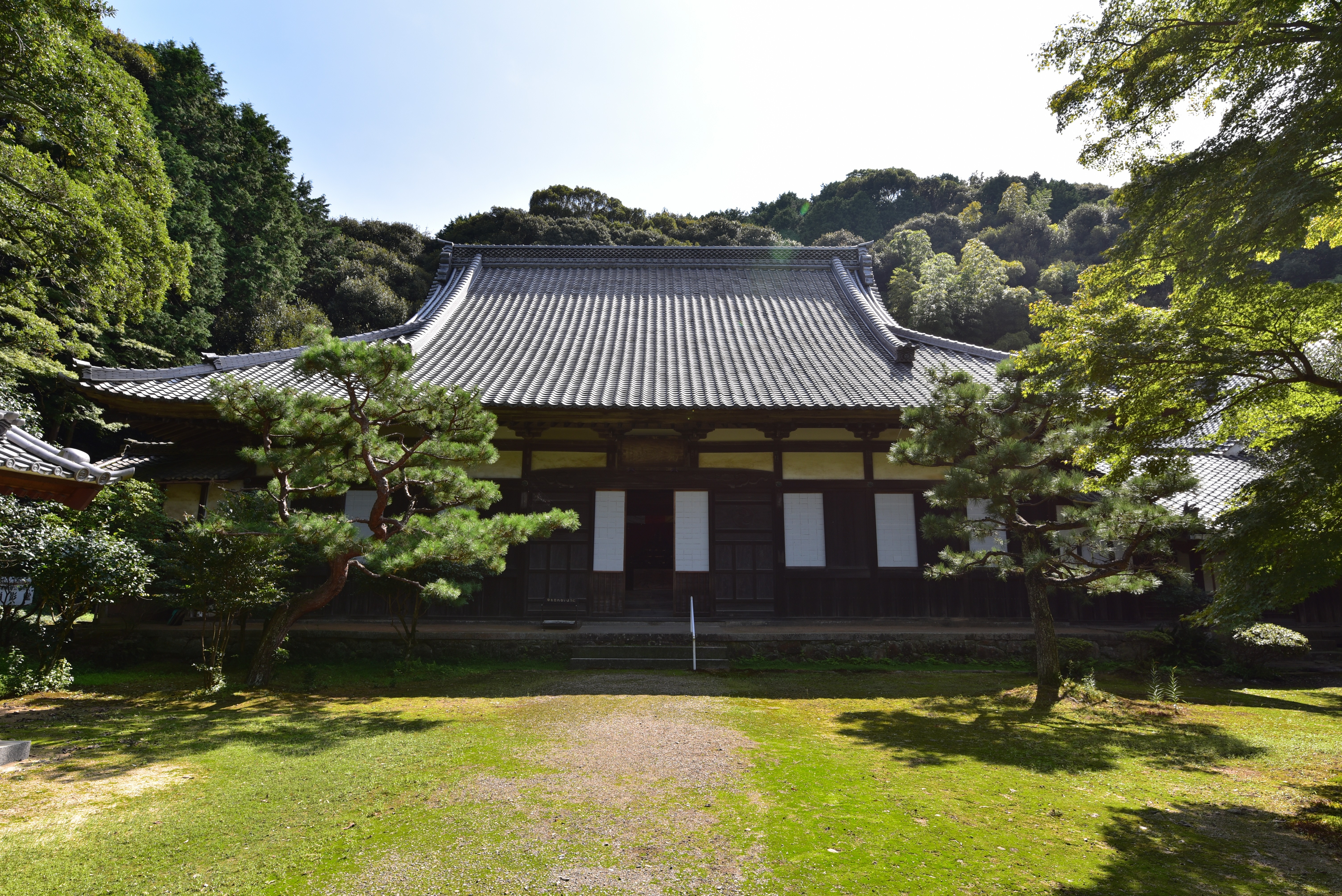 本堂は1816年に永平寺の大工棟梁によって再建されたもの。 Nikon D750